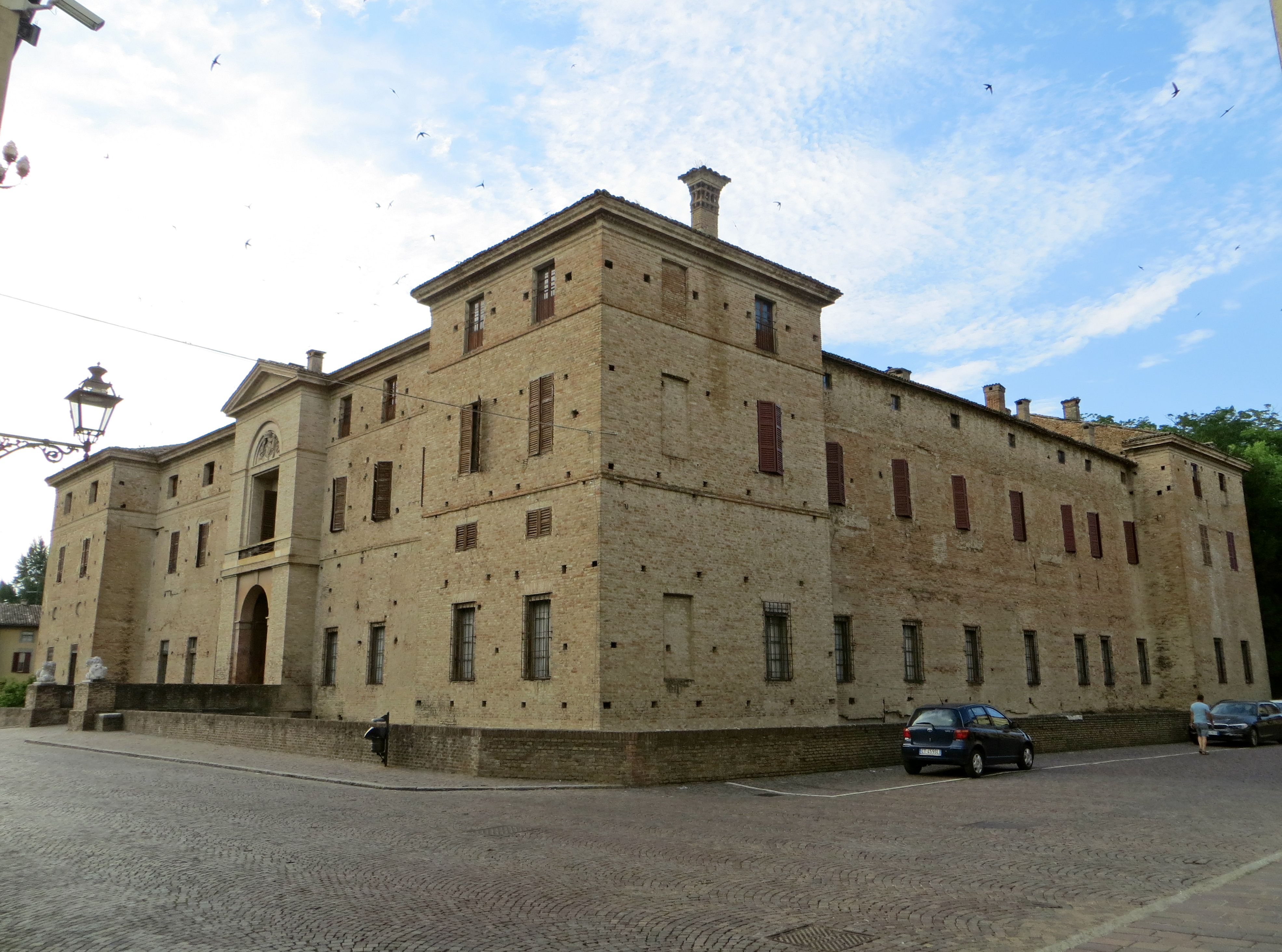 Rocca Meli Lupi (Soragna) - facciata e lato est